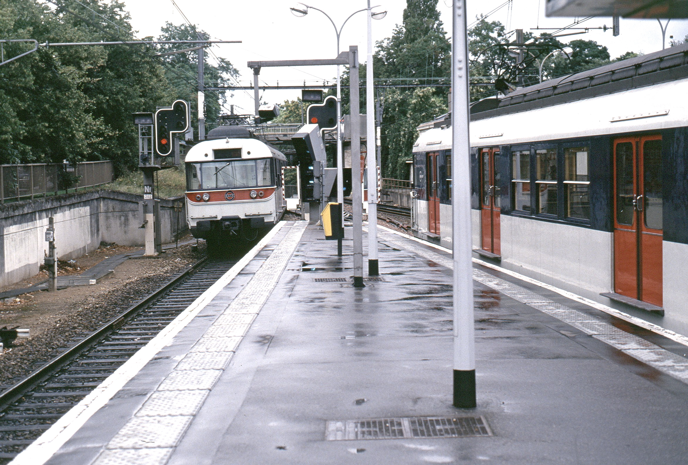 MS 61 de type A/B en gare du Vésinet - Le Pecq